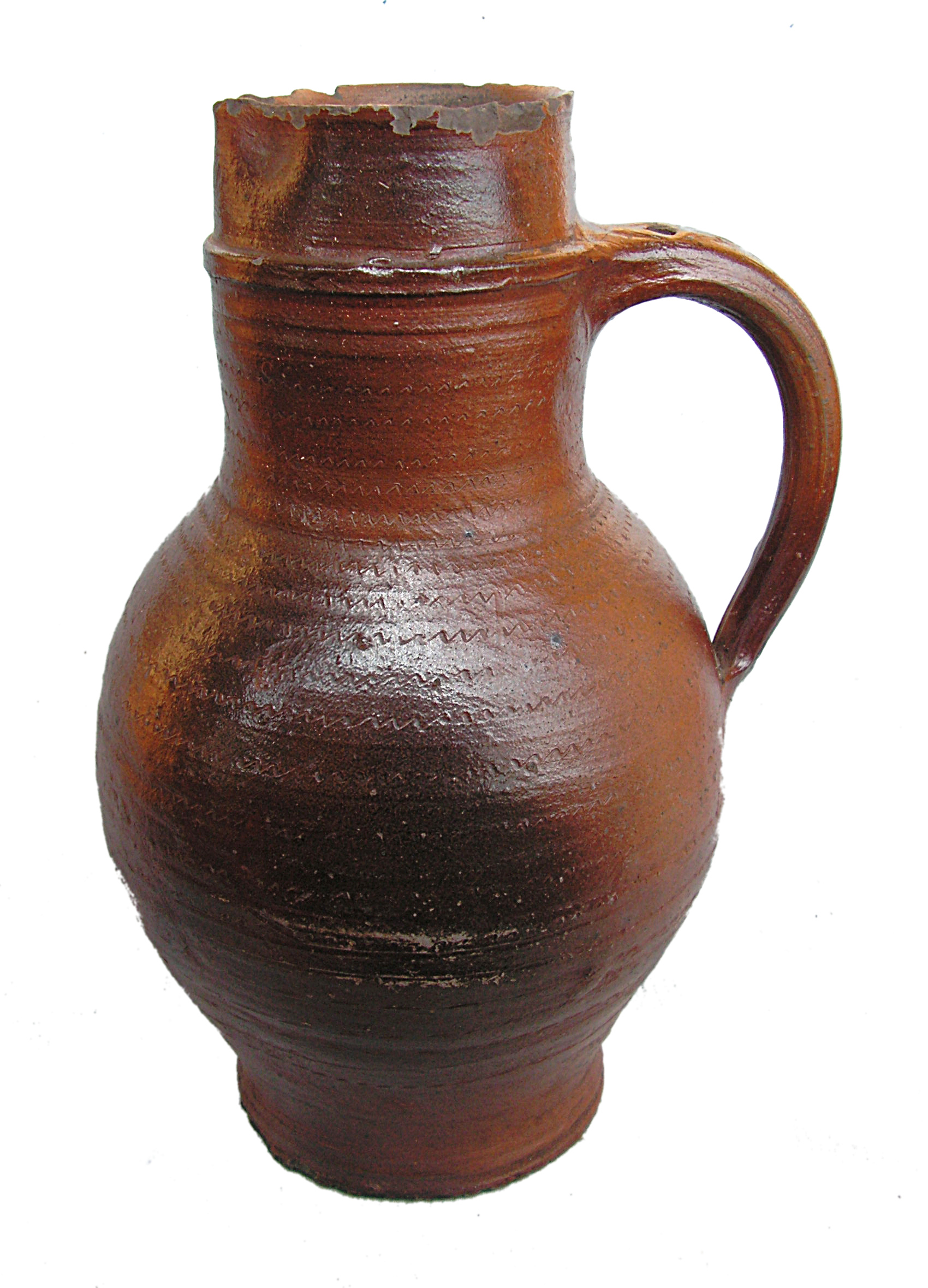 Kanne (rheinische Form) aus Niederbayern / Rottal